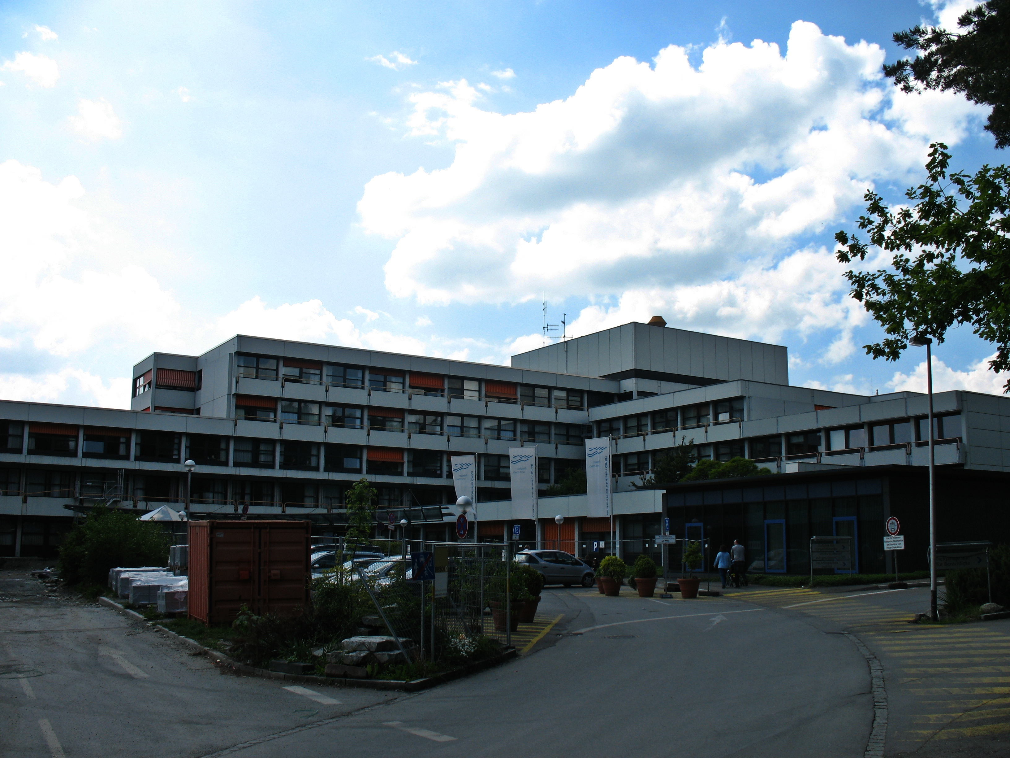 Haupteingang am Klinikum Friedrichshafen währrend des Baus des Mutter-Kind-Zentrums.